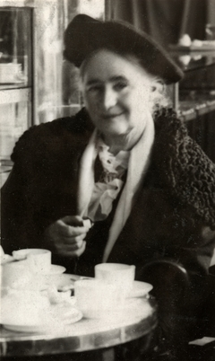 portrett, kvinne, lærerinne, forfatterinne, sittende halvfigur.